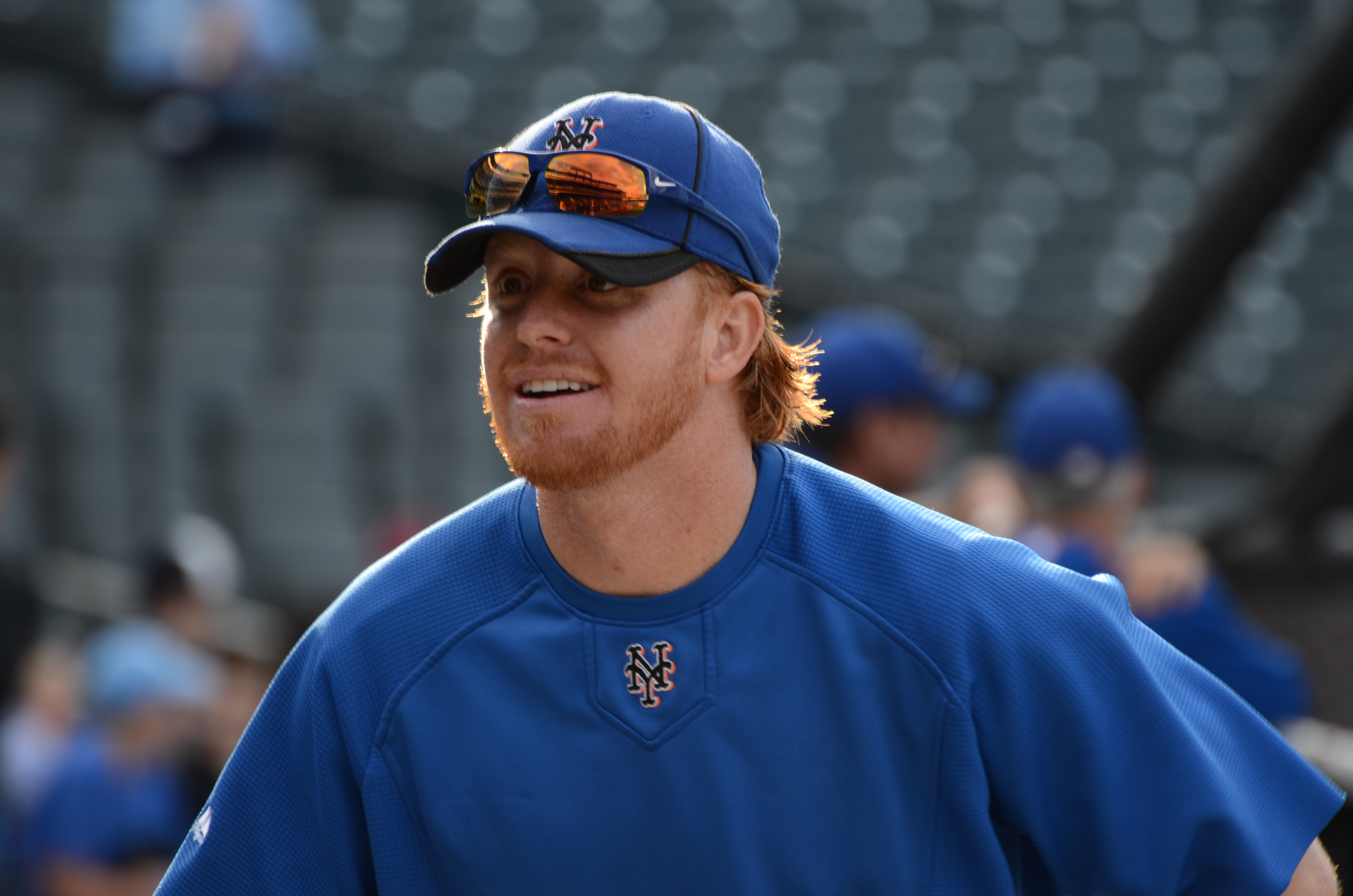 Justin Turner